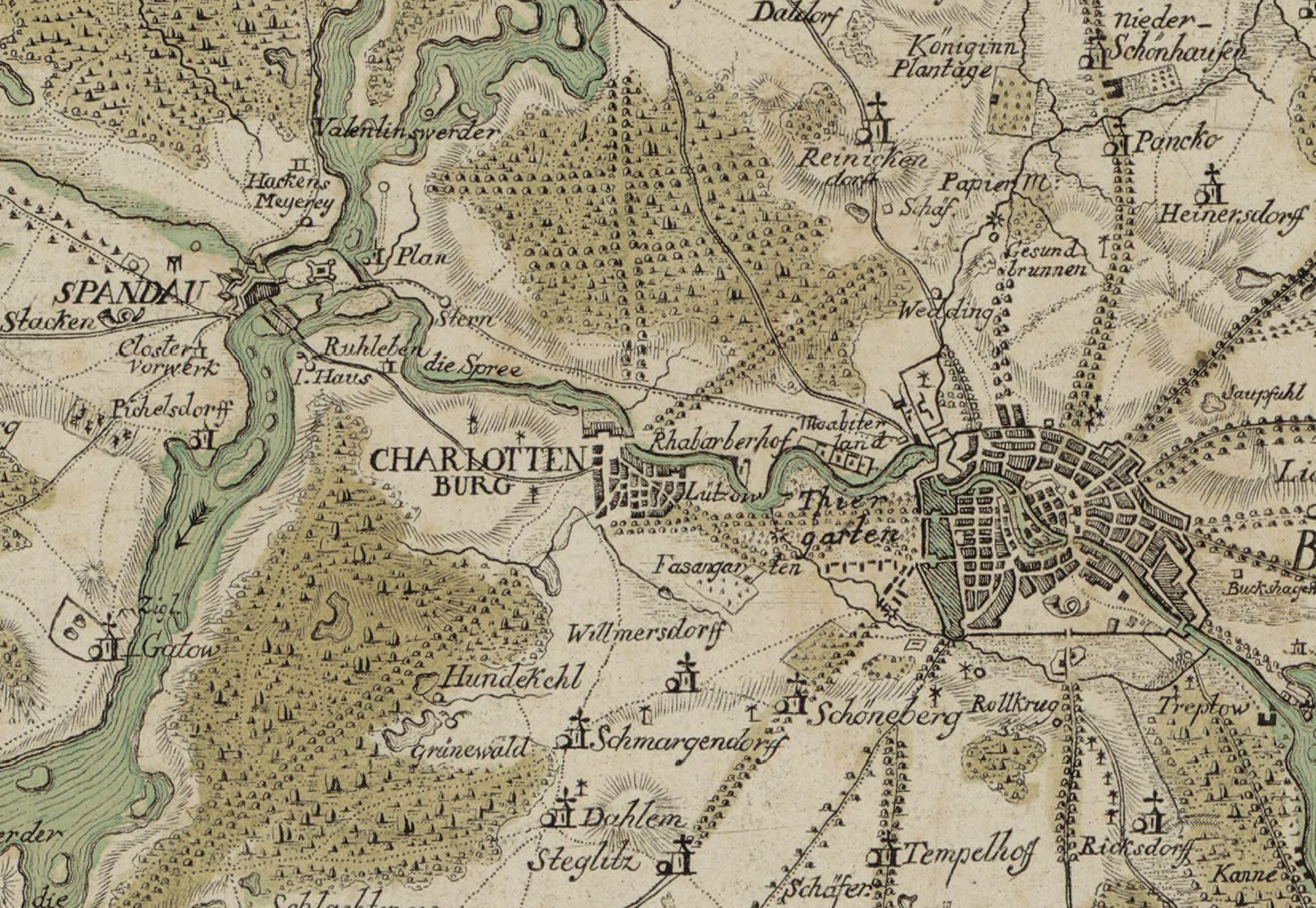 Der Weg zwischen Spandau und Berlin mit dem Nonnendamm auf einem Kartenausschnitt von Gegend_bey_Berlin_und_Potsdam_(kol.)_-_Oesfeld_1778.jpg. Ausschnitt von Gegend bei Berlin und Potsdam, Carl Ludwig von Oesfeld Format: 39,5 x 31,7 cm Maßstab: 1:220.000 Orient.: Nord Rechts unten der Titel auf einem Steinblock, darüber der gekrönte Königlich-Preußische Adler mit den Initialen FR, darunter eine Maßstabsleiste über 2 Teutsche Meilen. Über der Kartusche ein Kompass.